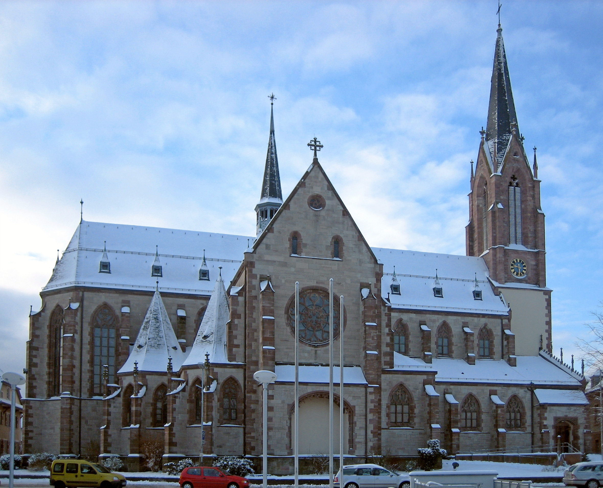 Die Kuppenheimer Stadtkirche St. Sebastian im Januar 2007